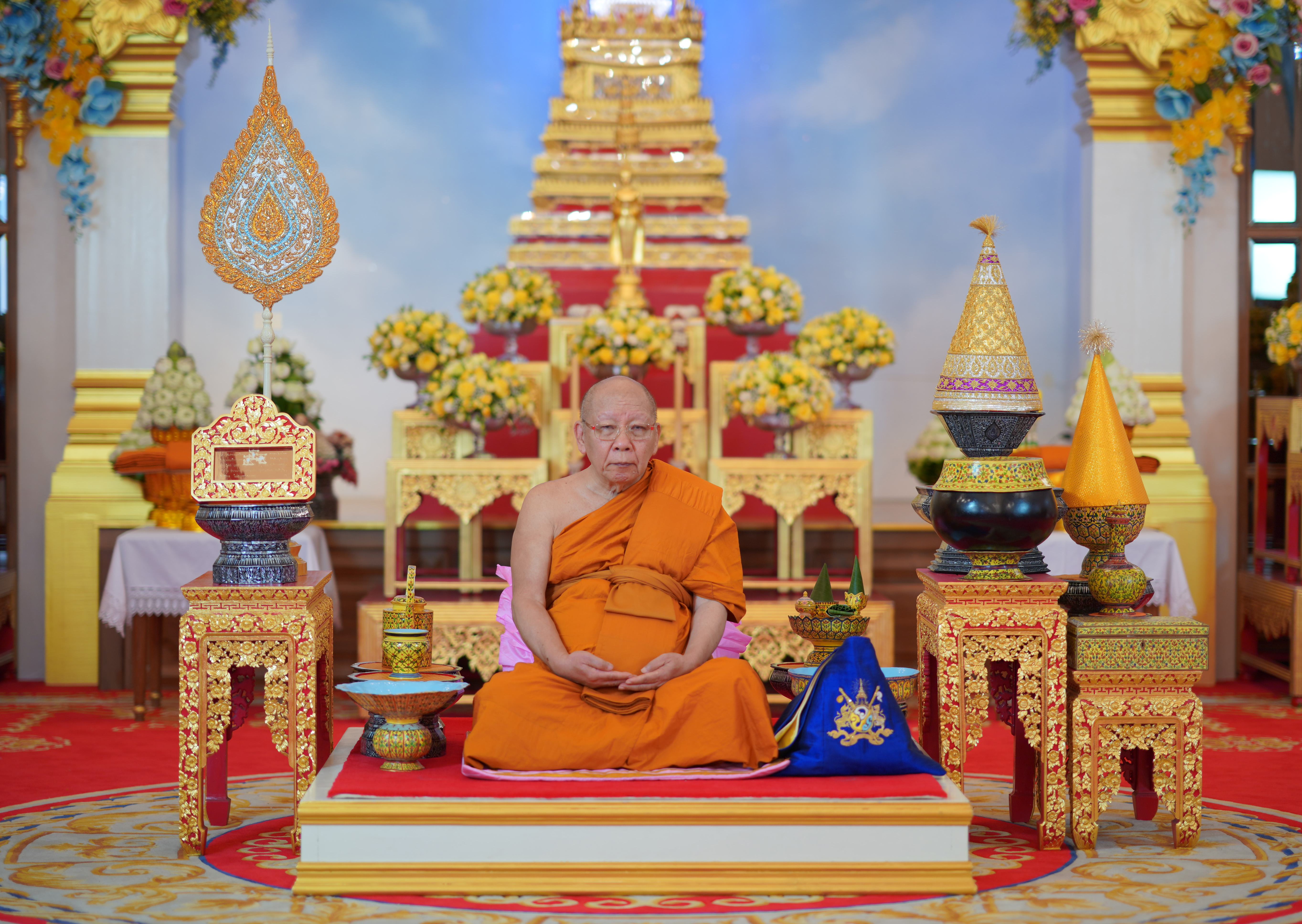 สมเด็จพระมหาธีราจารย์ วัดยานนาวา